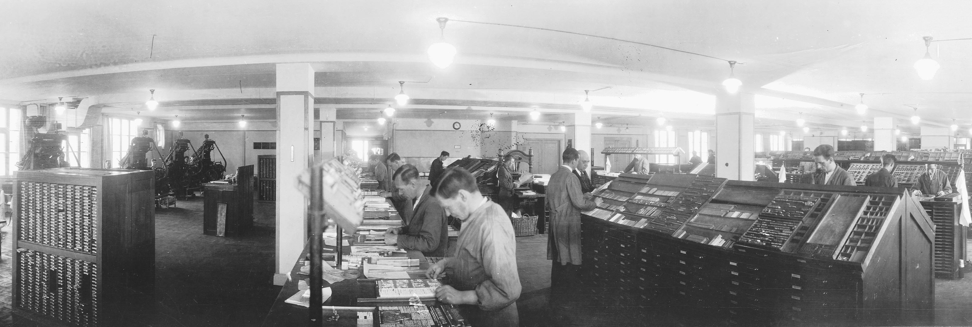 Vårt Hems sätteri, vid Götgatan / Ringvägen